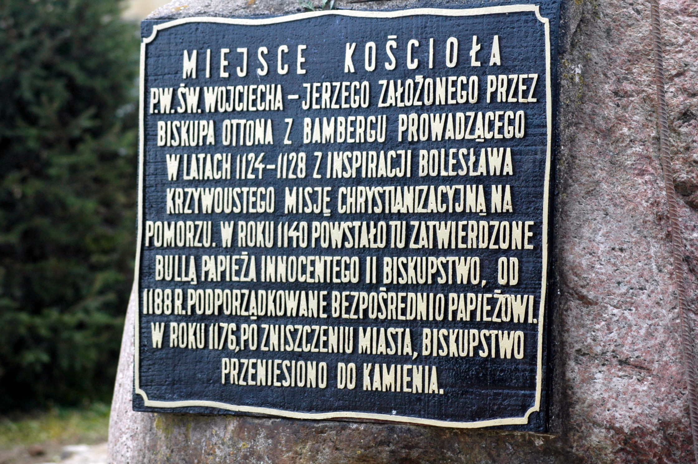 Miejsce kościoła pw. św. Wojciecha-Jerzego założonego przez biskupa Ottona z Bambergu prowadzącego w latach 1124-28 z inspiracji Bolesława Krzywoustego misję chrystianizacyjną na Pomorzu. W roku 1140 powstało tu zatwierdzone bullą papieża Innocentego II biskupstwo, od 1188 roku podporządkowane bezpośrednio papieżowi. W roku 1176, po zniszczeniu miasta biskupstwo przeniesiono do Kamienia Pomorskiego.